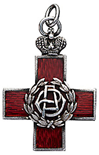 Жетон Крестовоздвиженской общины сестер милосердия